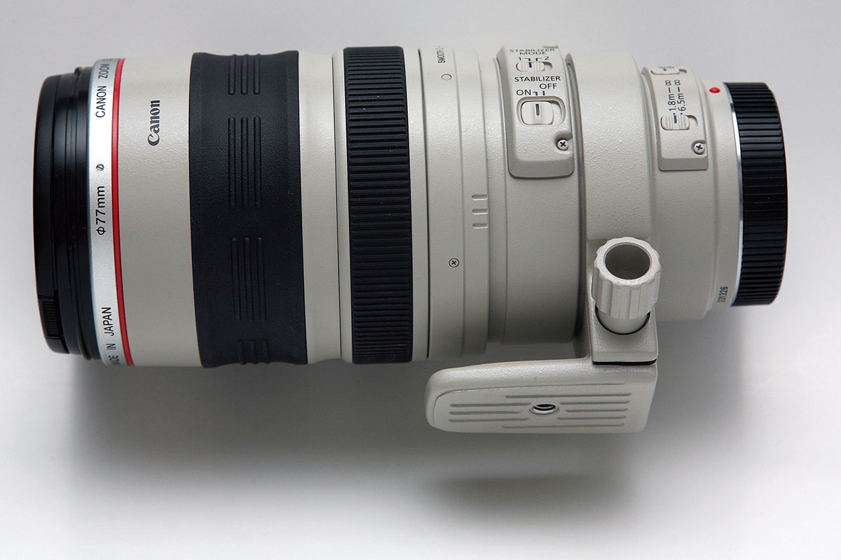 self made